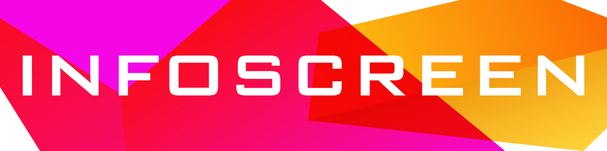 Logo von Infoscreen Austria